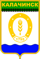 Официальный герб города